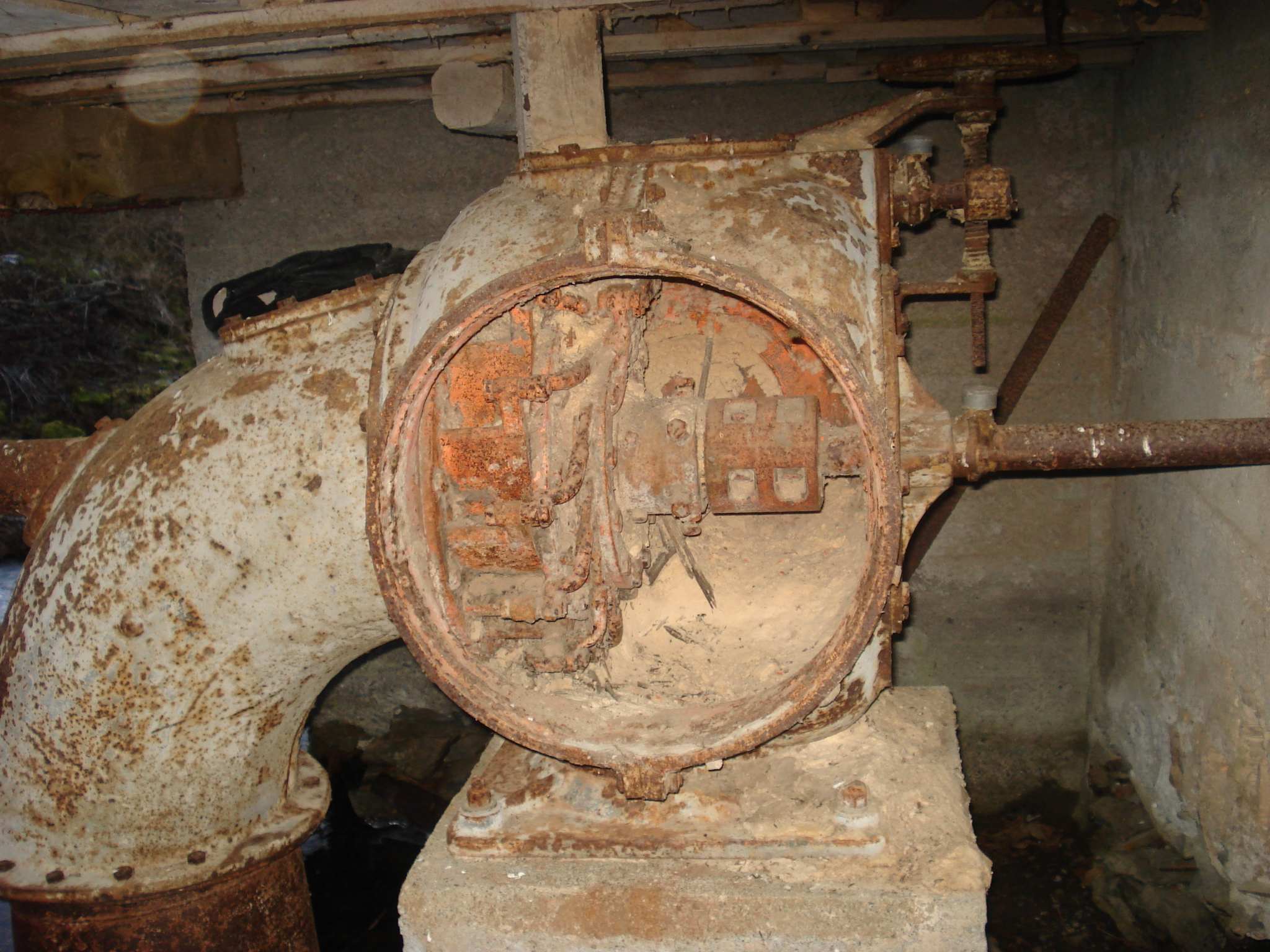 Francisturbinen, et kulturminne.